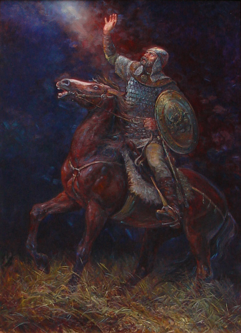 Тангра, худ. Александър Алексиев - Хофарт